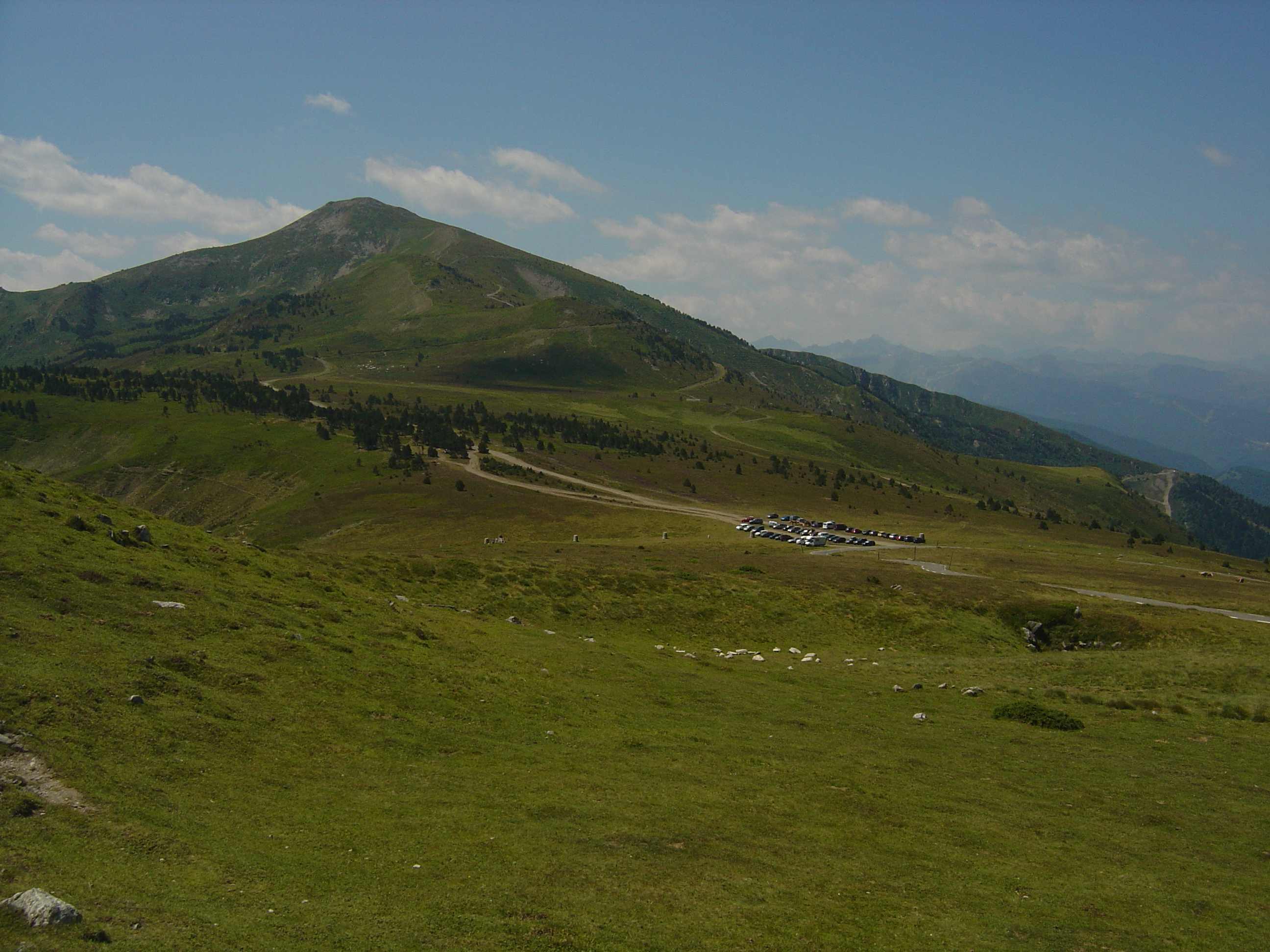 Ariège (Midi-Pyrénées, France) - Pic de Tarbezou (2364m) vu depuis le port de Pailhères (2001m)